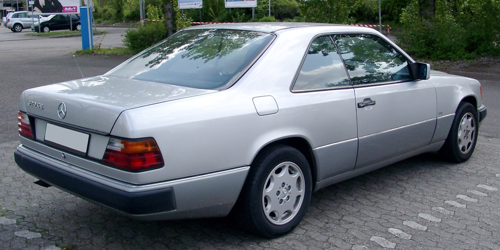 Mercedes-Benz C124 (320 CE)